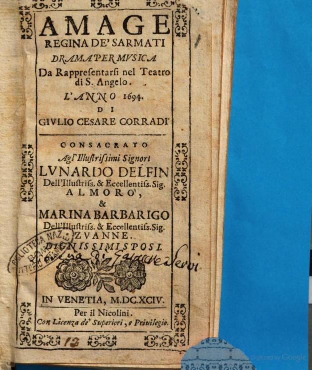 Amage regina de' Sarmati drama per musica da rappresentarsi nel teatro di S. Angelo. L'anno 1694. Di Giulio Cesare Corradi